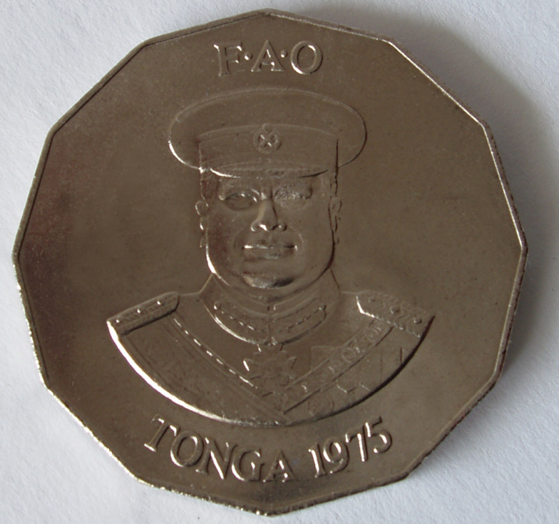 Tonga, 50 Seniti, 1975, front, d=31.6 mm, cu/ni